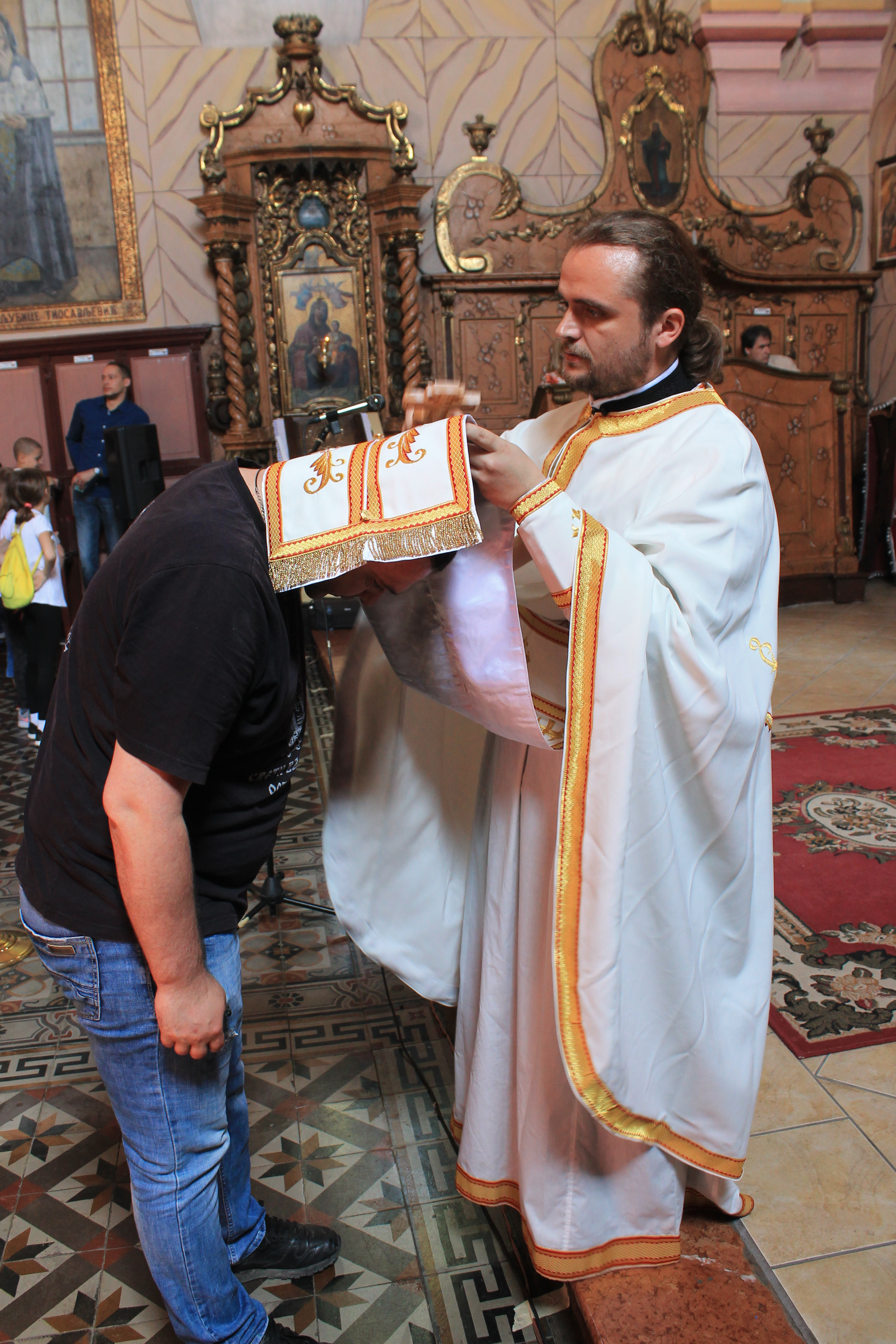 Proslava Slave crkve, Šid 22. maj 2018.